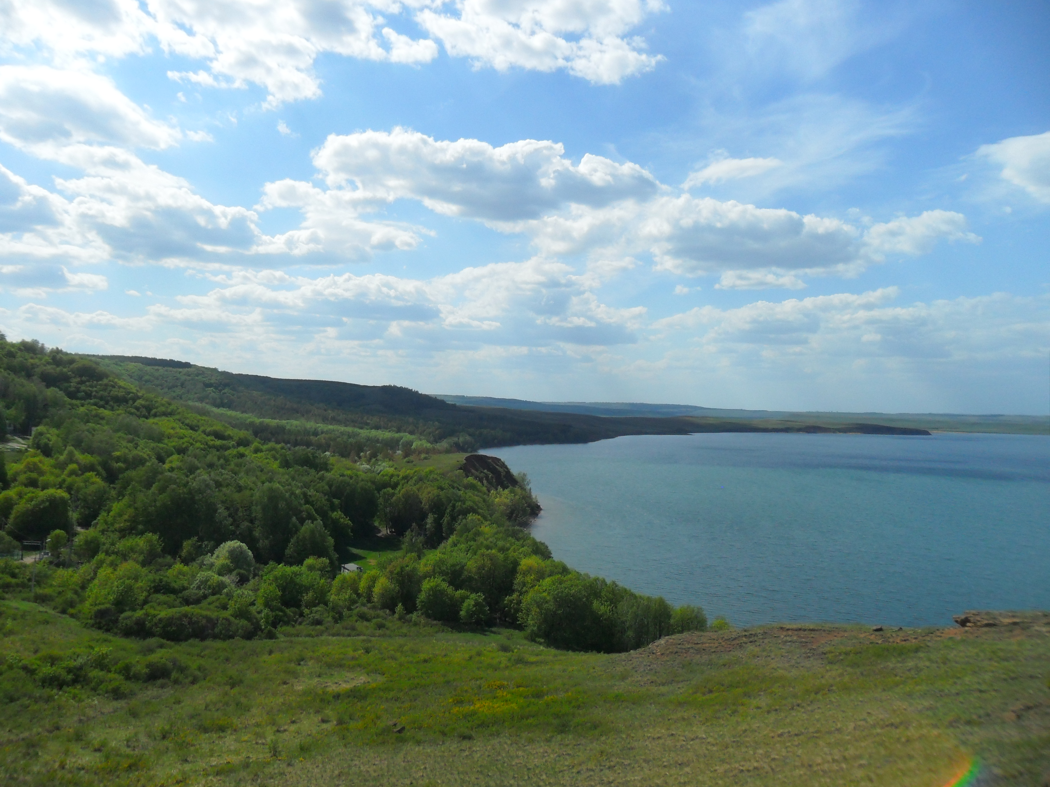 Аслы-Куль, Давлекановский район This image is related to the protected area of Russia number 0210115